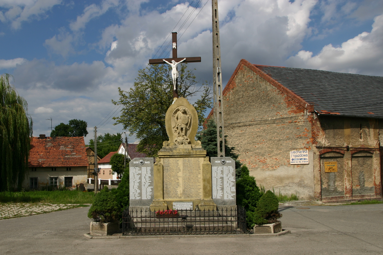 Śmicz (dodatkowa nazwa w j. niem. Schmitsch) – wieś w Polsce położona w województwie opolskim, w powiecie prudnickim, w gminie Biała.